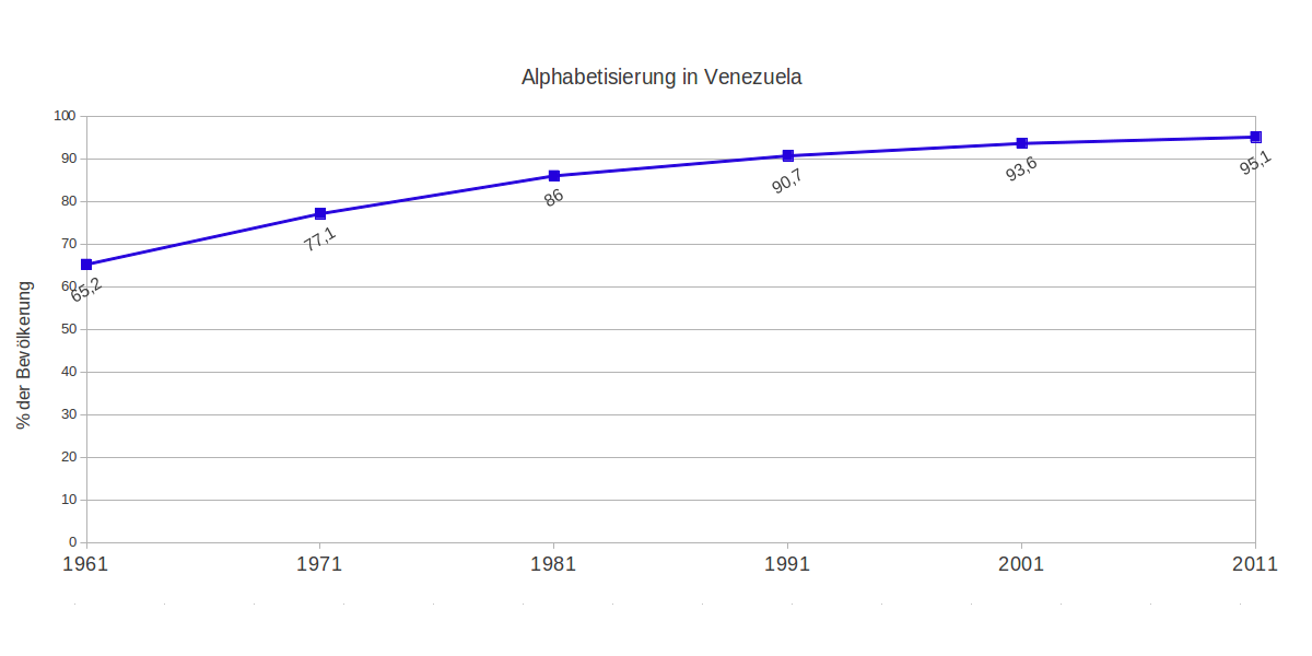 Alphabetisierungsrate in Venezuela. Volkszählungen 1961-2011